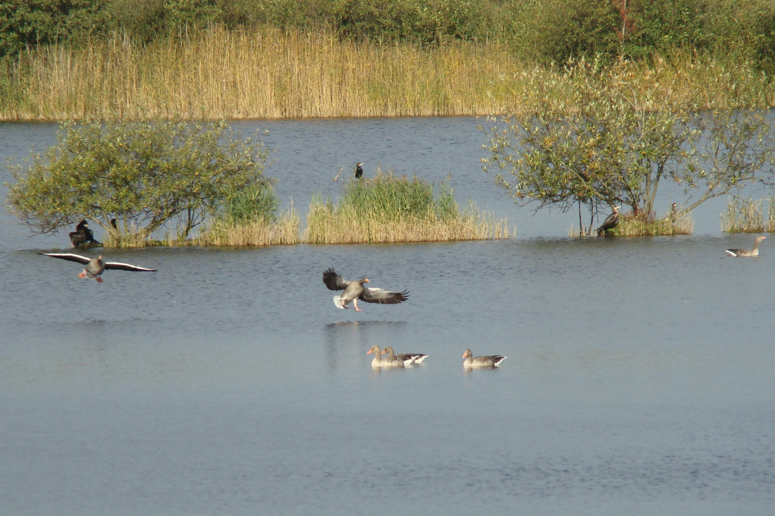 Teichinsel mit Kormoranen, davor Graugänse Lake island with cormorants and greylag geese - Meißendorf Lakes, Lower Saxony, Germany.